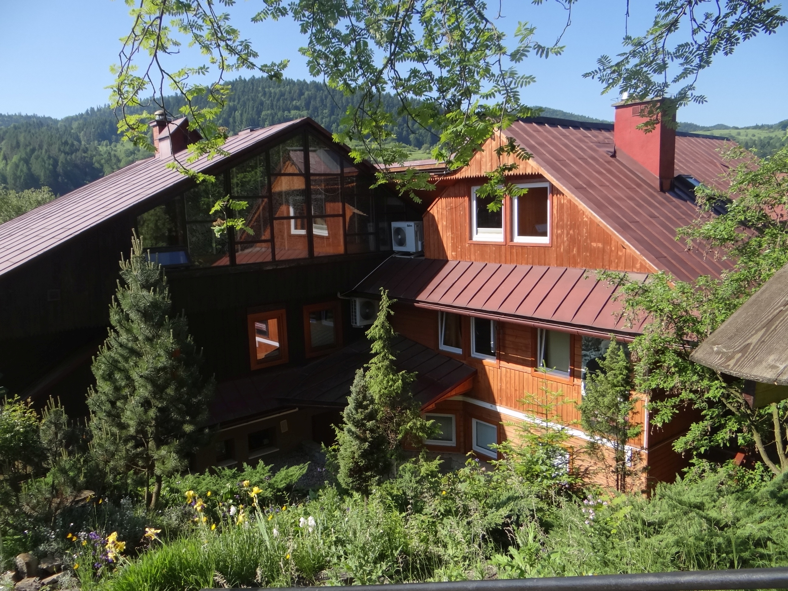 Kopa Górka. Ośrodek Ruch Światło-Życie